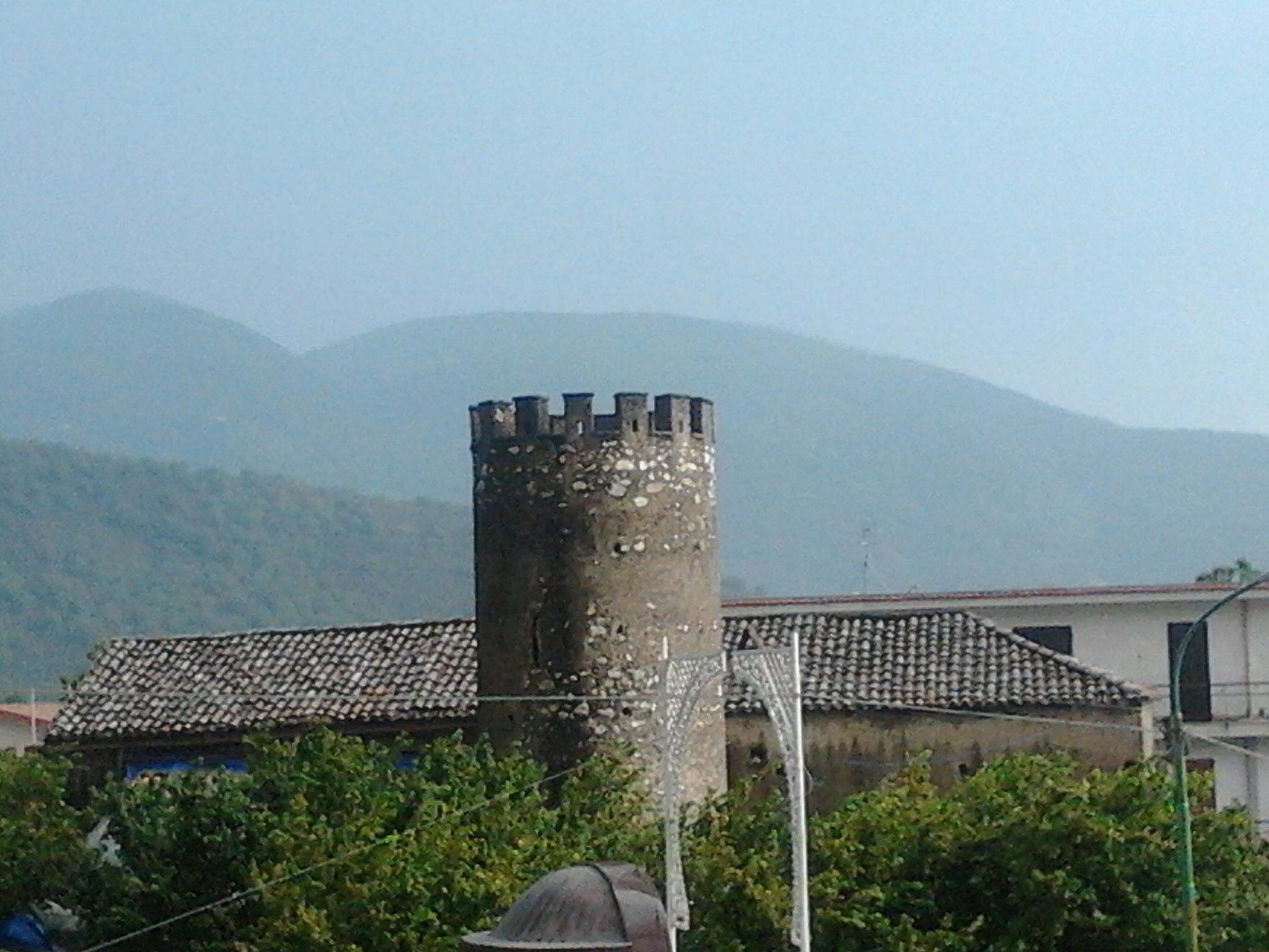 Foto scattata con il mio samsung galaxy next